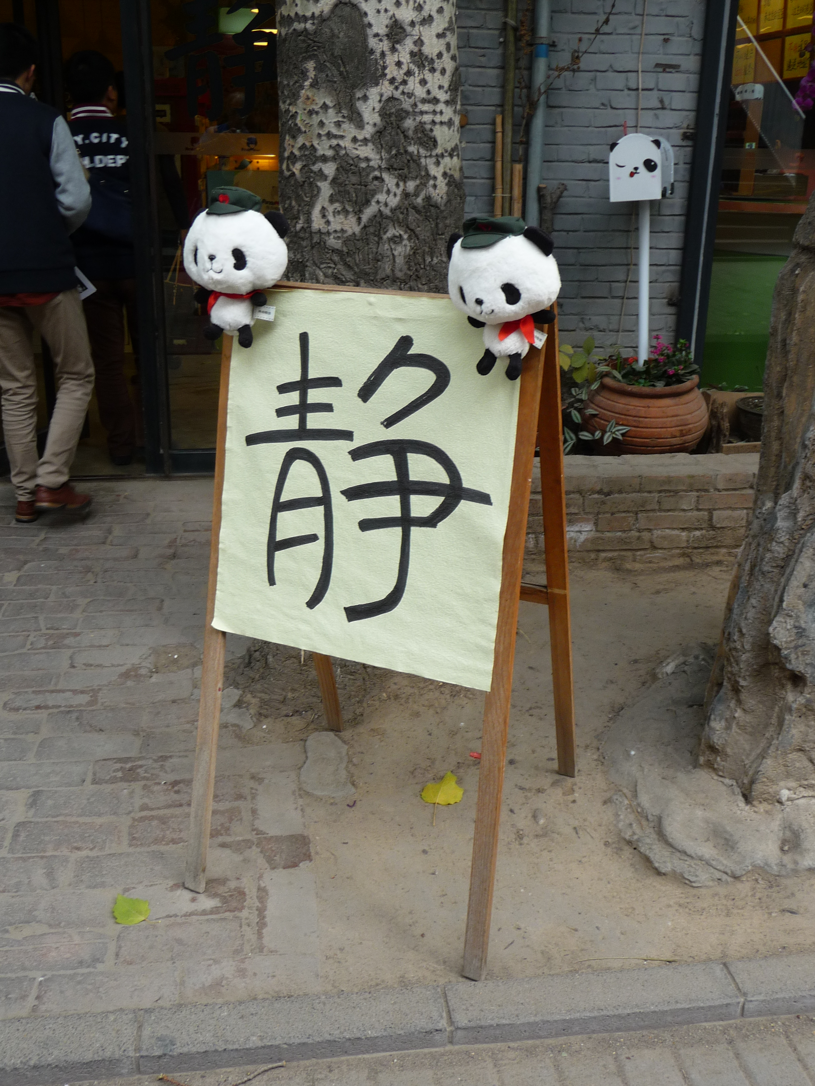 Kunstbezirk 798 in Peking